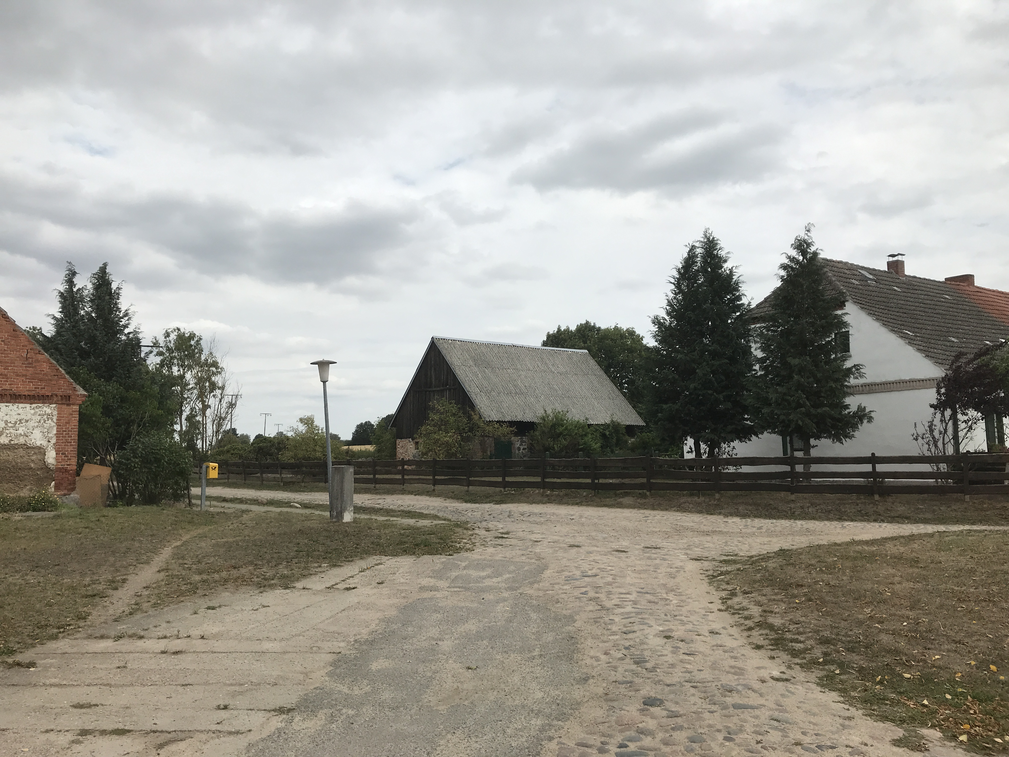 Rehberg, ein Ortsteil der Gemeinde Spantekow in Mecklenburg-Vorpommern